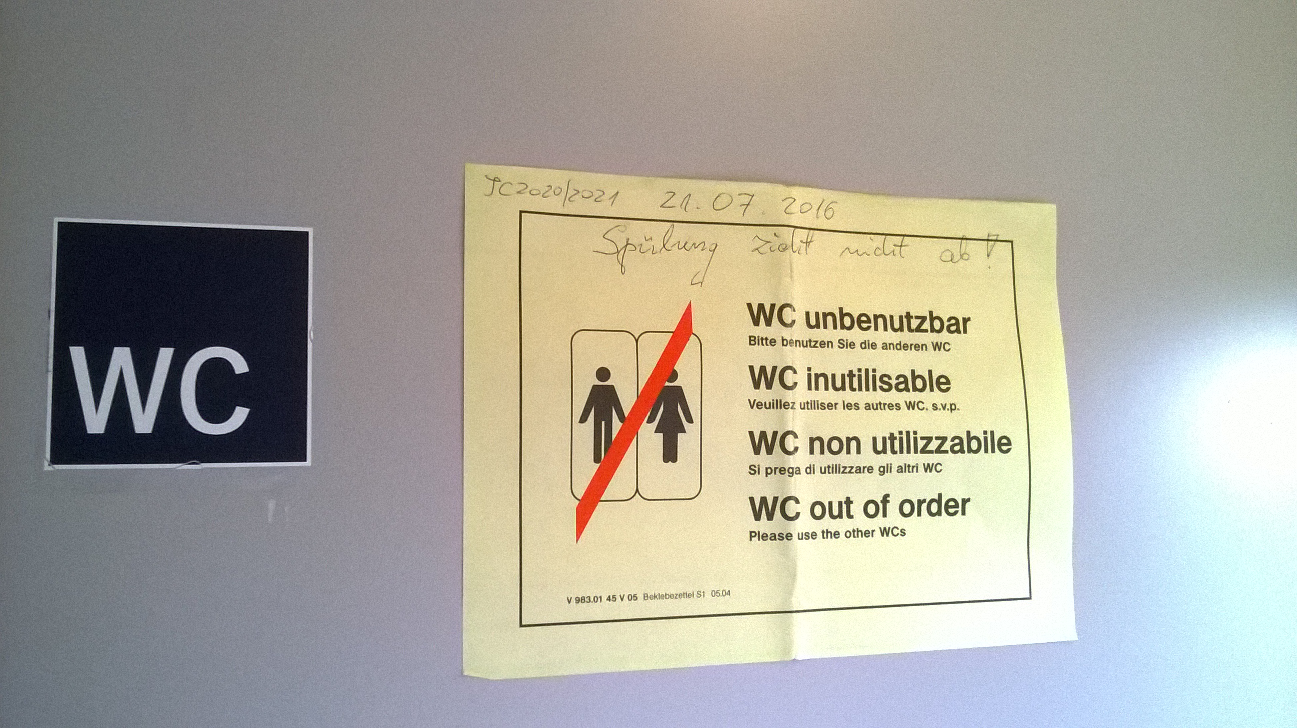 Hinweis auf funktionsgestörte Zugtoilette